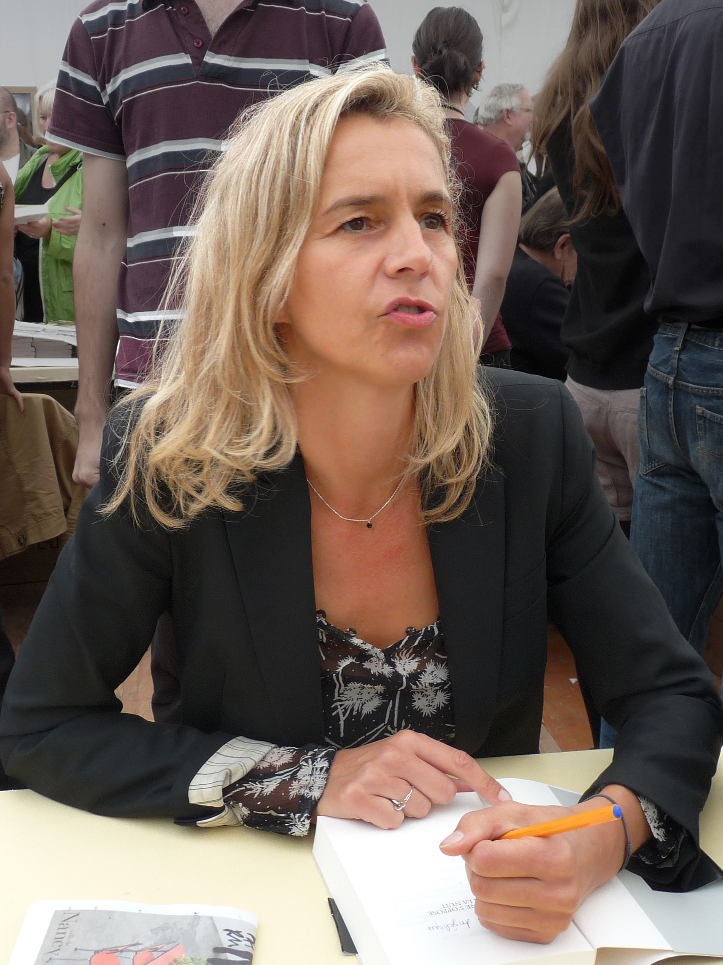 Delphine de Vigan en dédicace à Nancy (Le Livre sur la Place 2011)